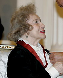 Ольга Лепешинская